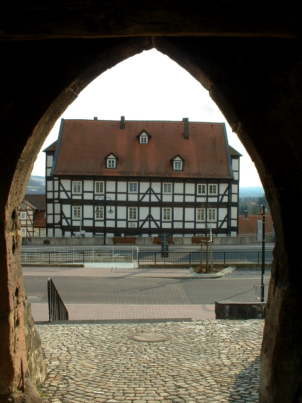 Stiftsgebäude vom Neuen Tor aus gesehen